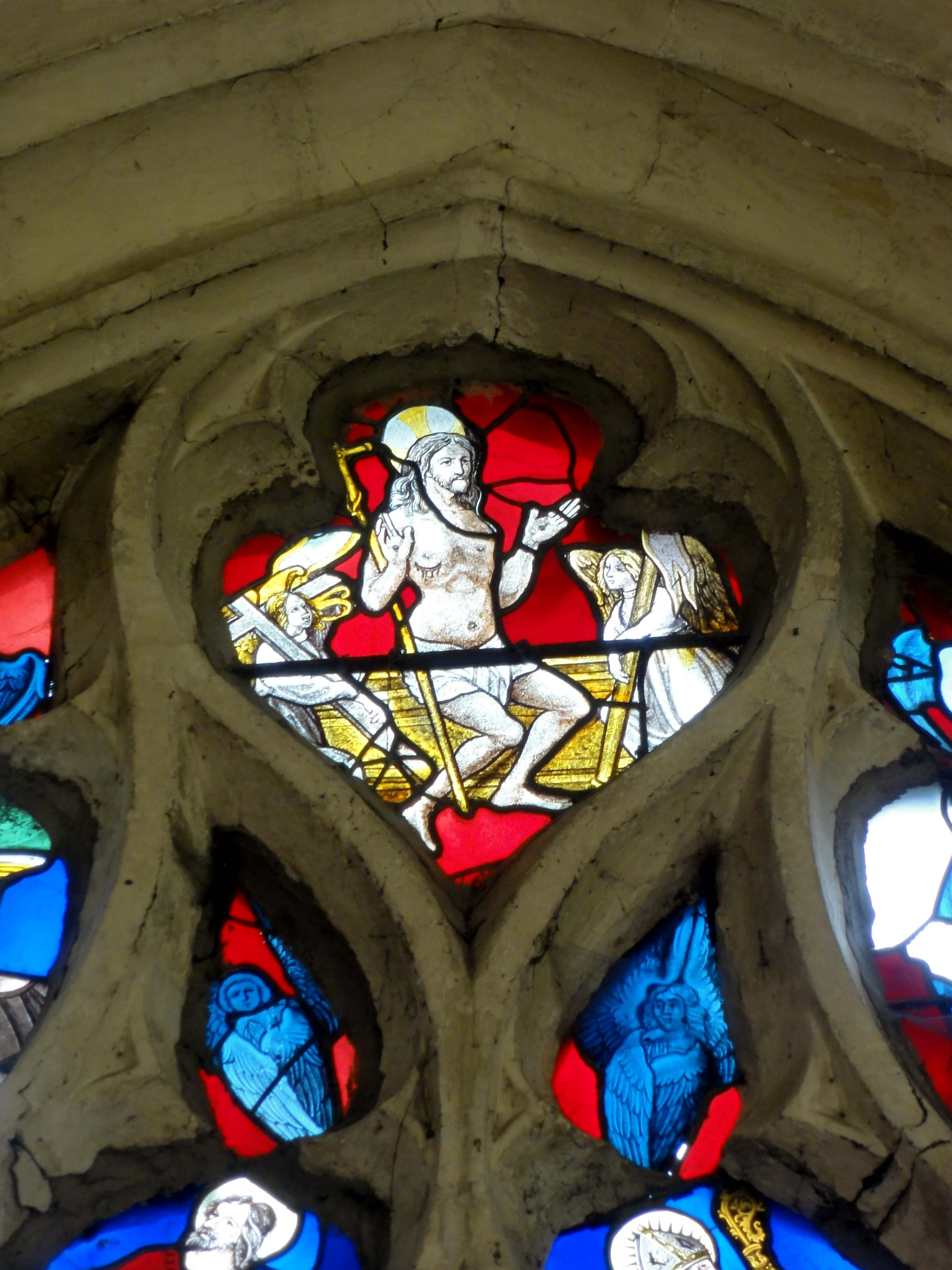 Verrière n° 4 (qualifiée comme verrière n° 2 dans la base Palissy), détail - Résurrection du Christ.